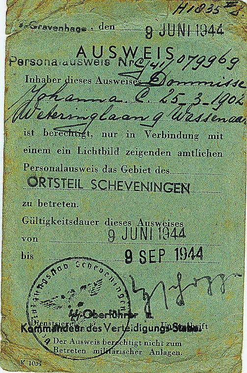 'Ausweis', afgegeven op 9 juni 1944